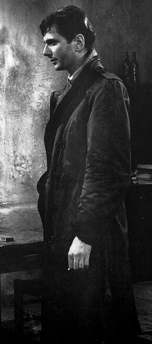 Heinz Hopf i Smutsiga händer av Sartre. TV-teater 1963